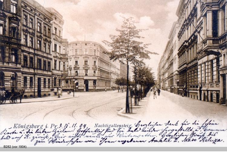 Fotografie des Nachtigallensteigs in Königsberg i. Pr.